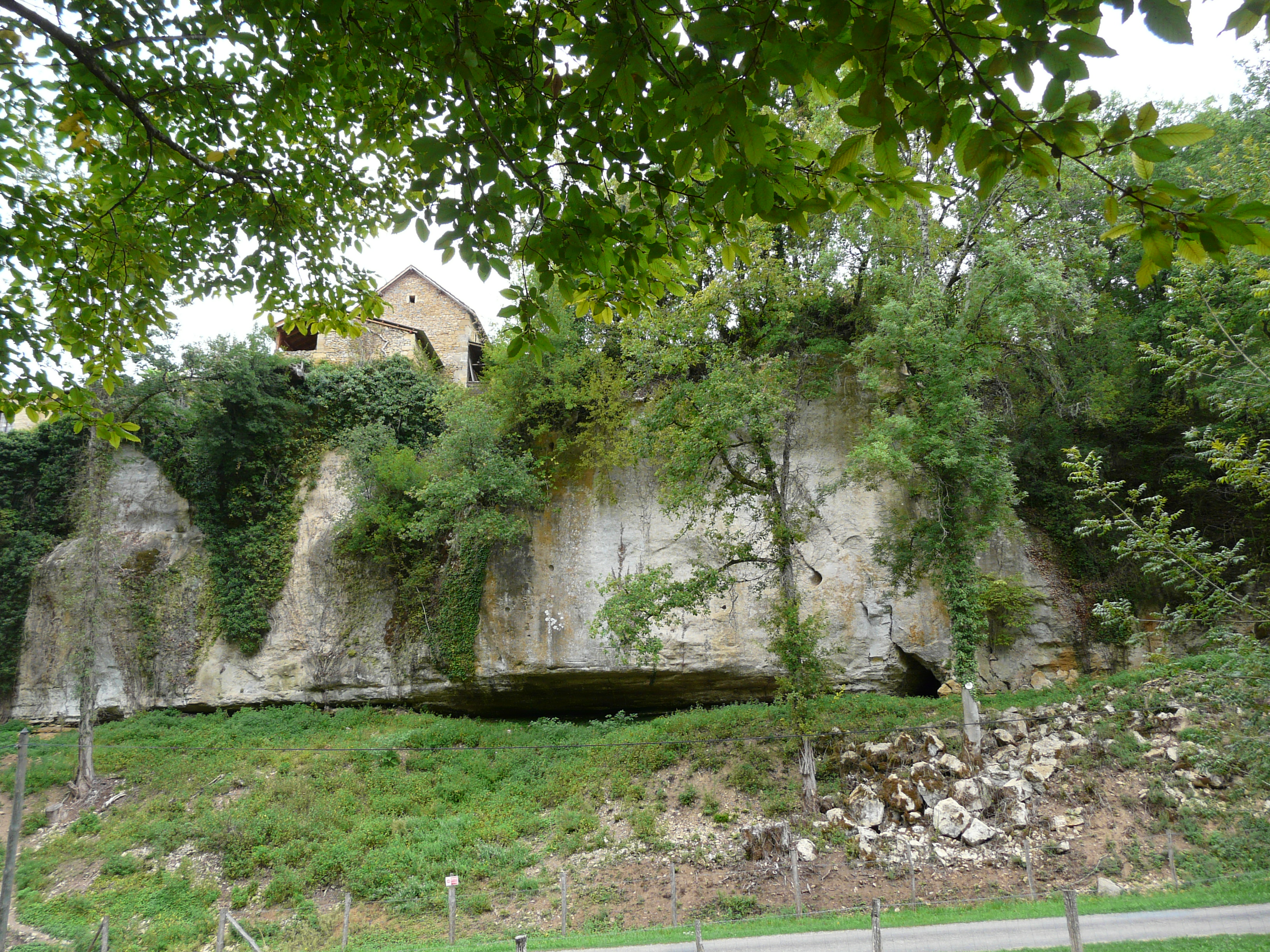 L'abri Castanet, site préhistorique sur la commune de Sergeac, dans le vallon de Castel Merle, Dordogne, France. .